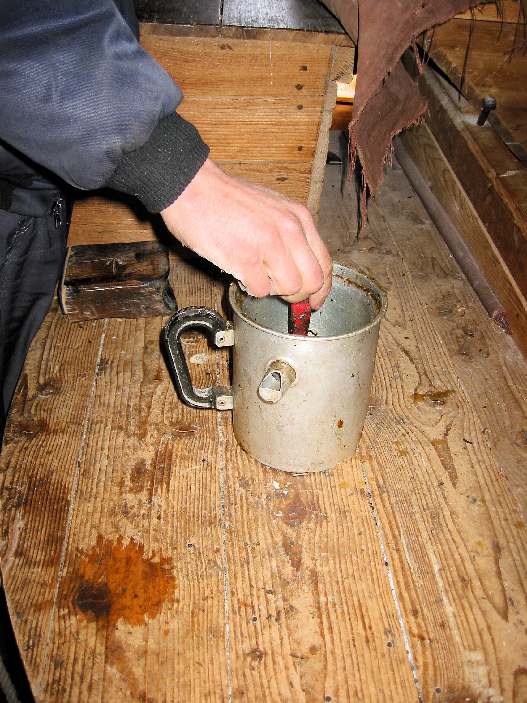 Doesburgermolen: kammen wassen Au bain-marie, Ede, the Netherlands